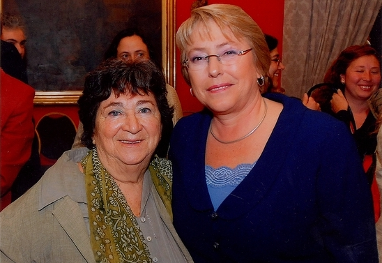 Mireya Baltra junto a la presidenta Michelle Bachelet.